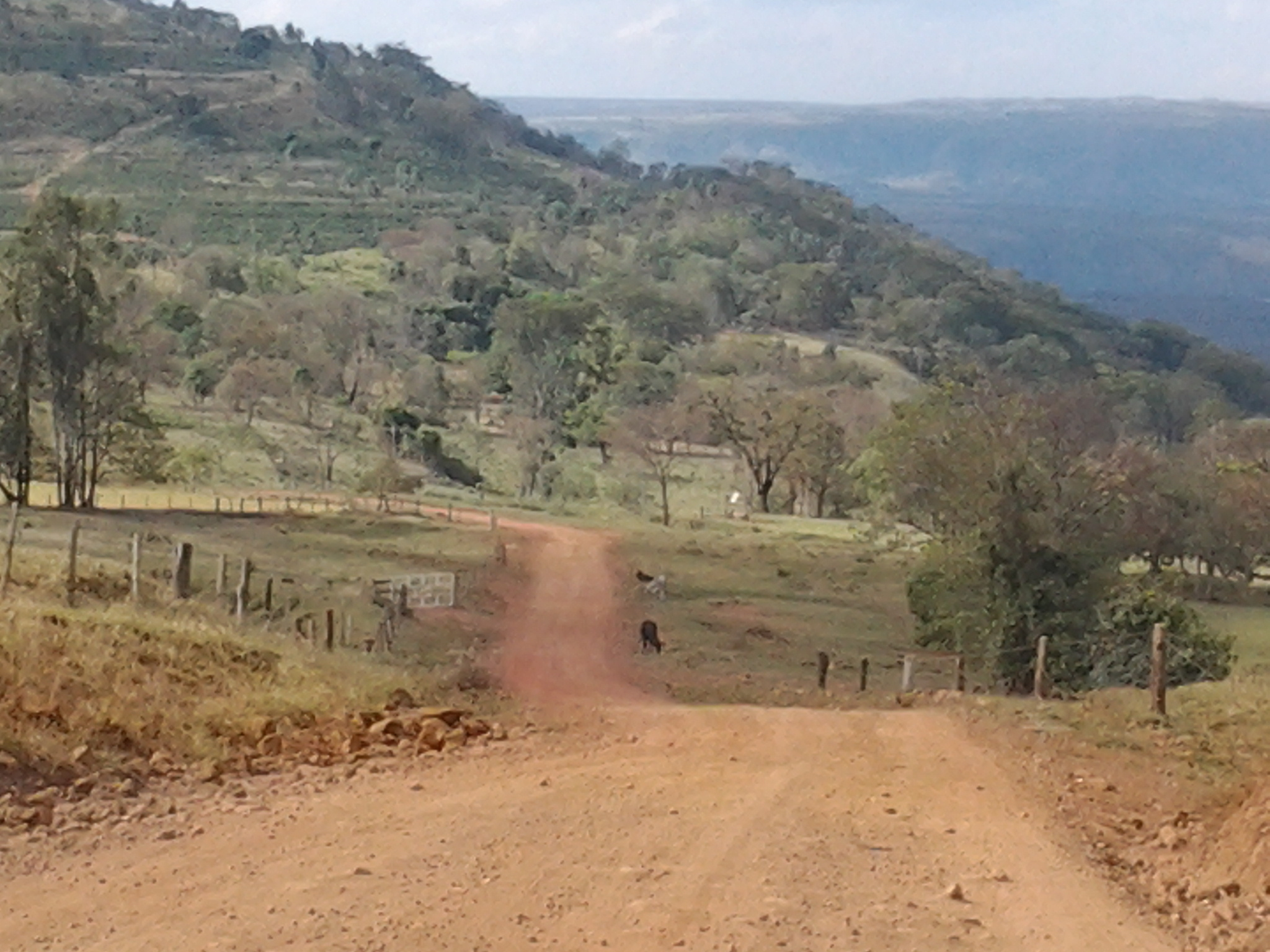 Natureza